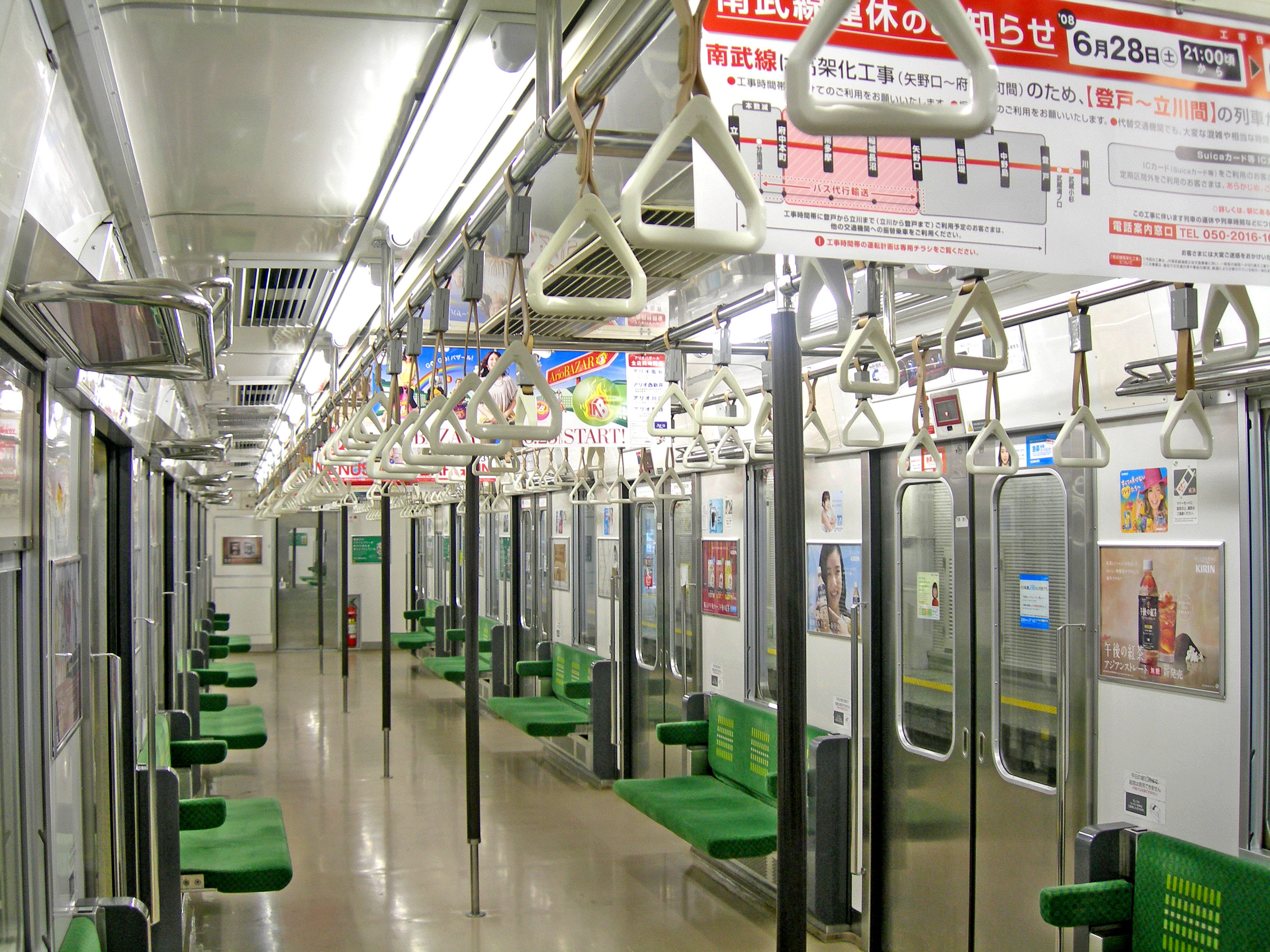 サハ204形0番台車内